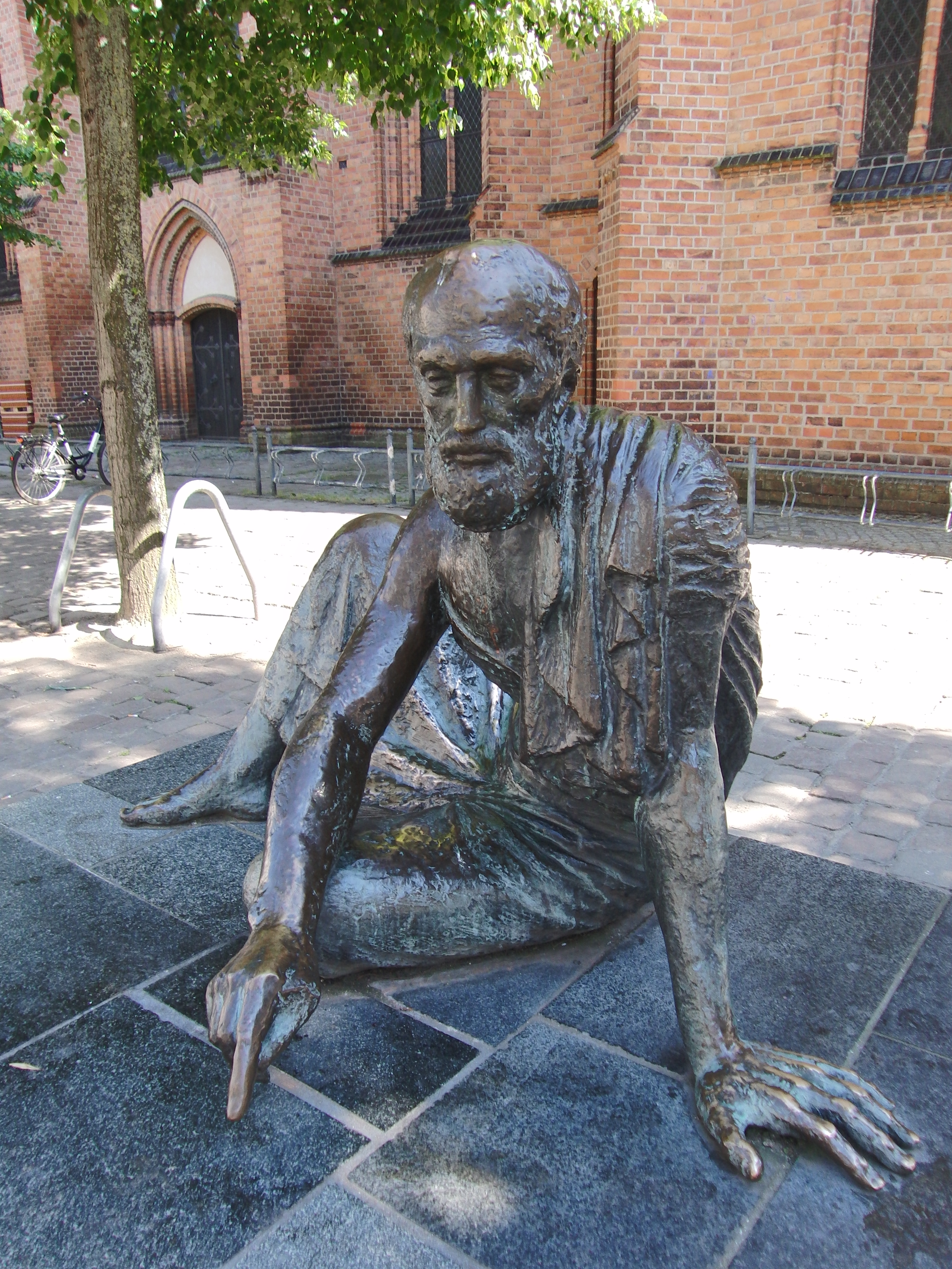 Die Skulptur von Archimedes vor der Güstrower St. Marienkirche